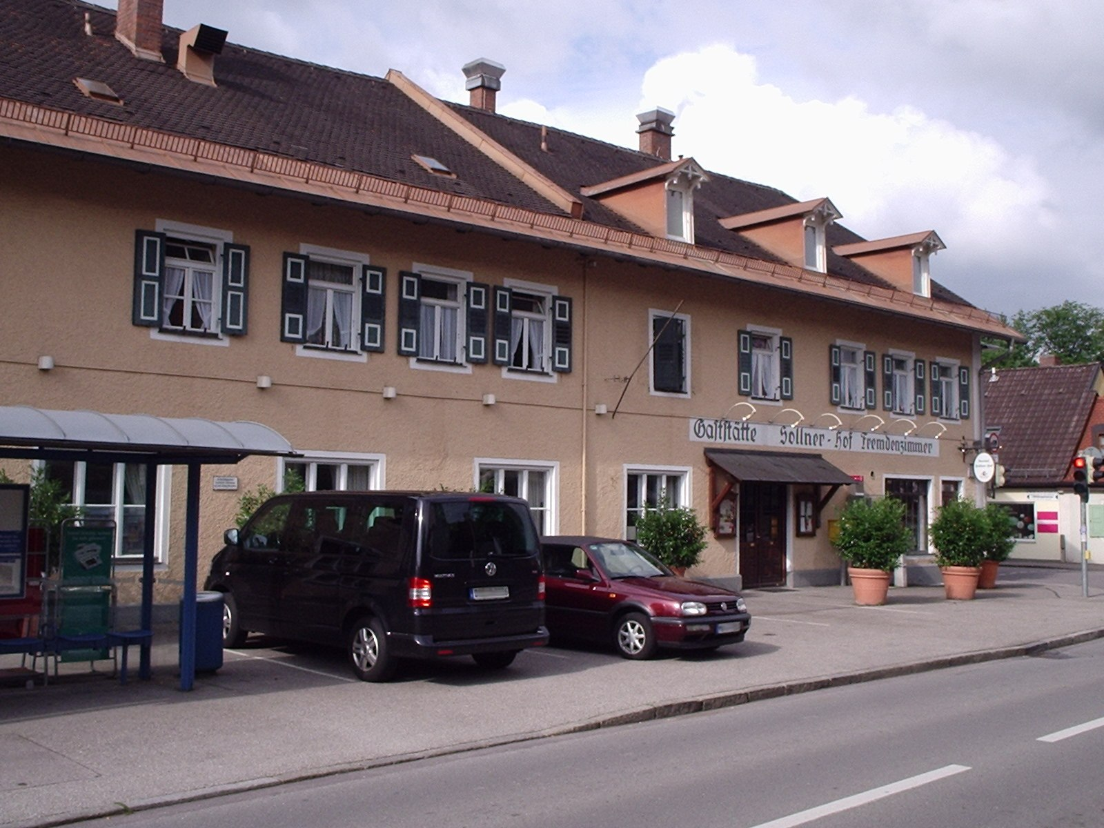 Gaststätte Sollner Hof, Herterichstr., München